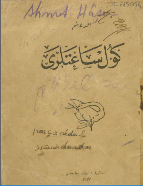 Göl Saatleri kitabınını 1918'de basılmış Osmanlıca ilk baskısı